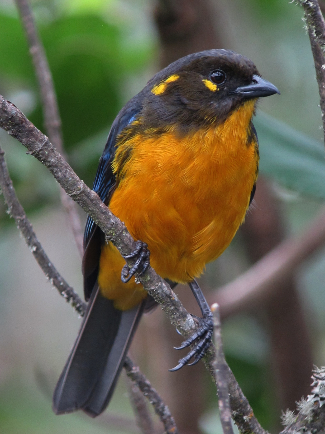 Manizales, Caldas, Colombia